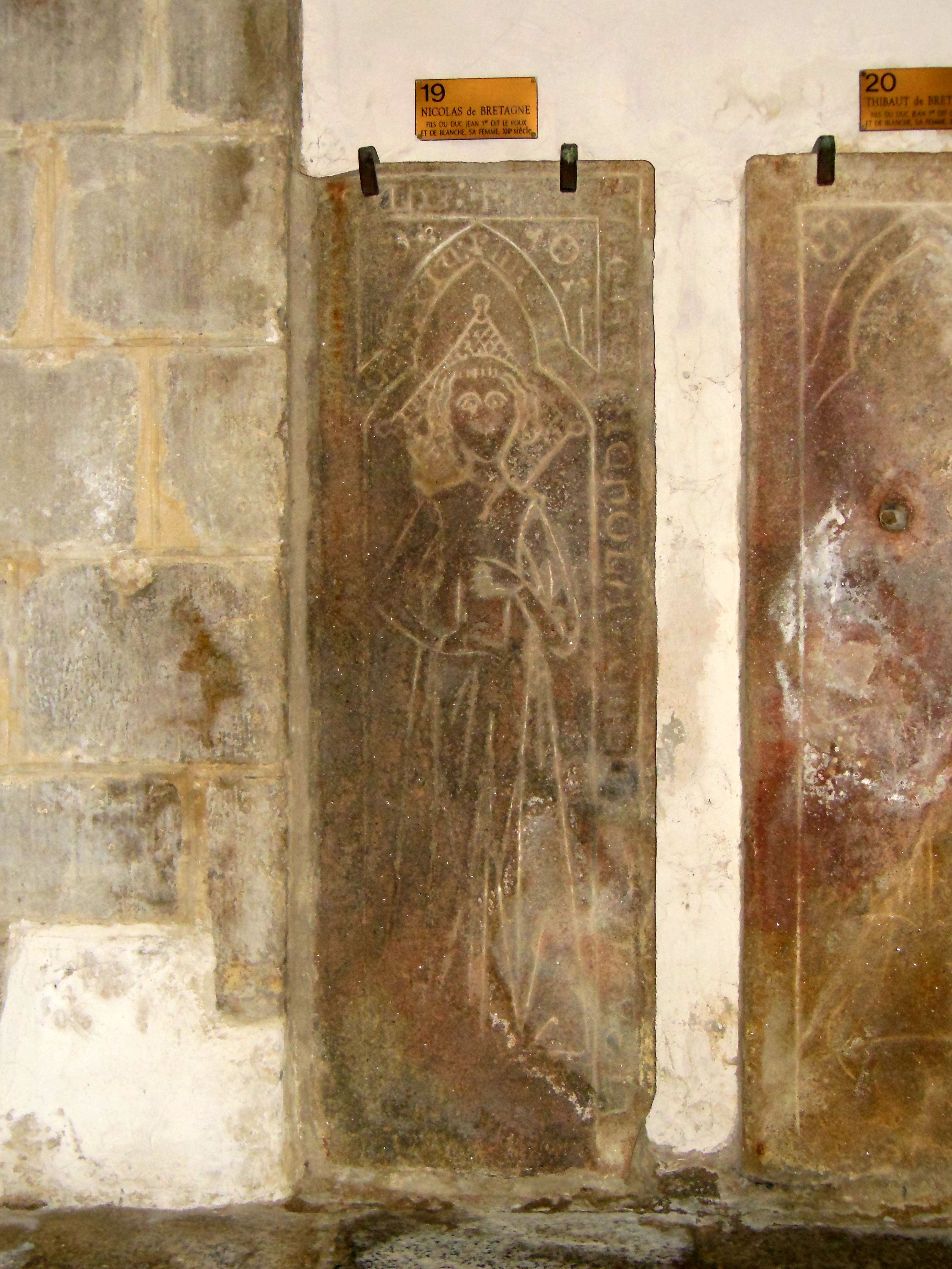 Pierre tombale de Nicolas de Bretagne (1249-1251), dans l'abbaye Saint-Gildas de Rhuys (Morbihan, France)